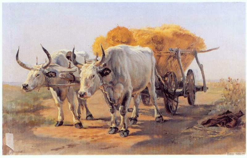 Волы (45 х 71). Холст, масло. Слева внизу подпись: Е. Врангель. Приобретена П. М. Третьяковым в 1891 г. у автора.